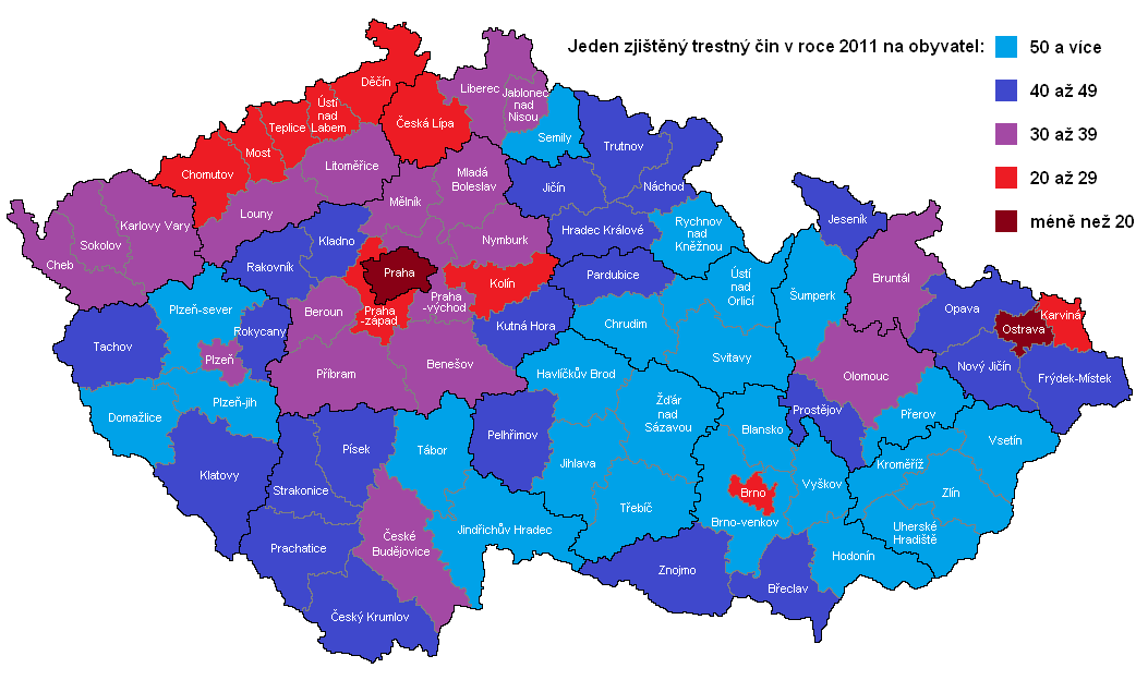 Mapka zjištěných trestných činů na počet obyvatel v roce 2011 podle okresů